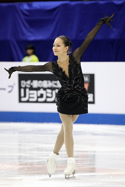 Станислава Константинова (Россия) на чемпионате мира среди юниоров 2017